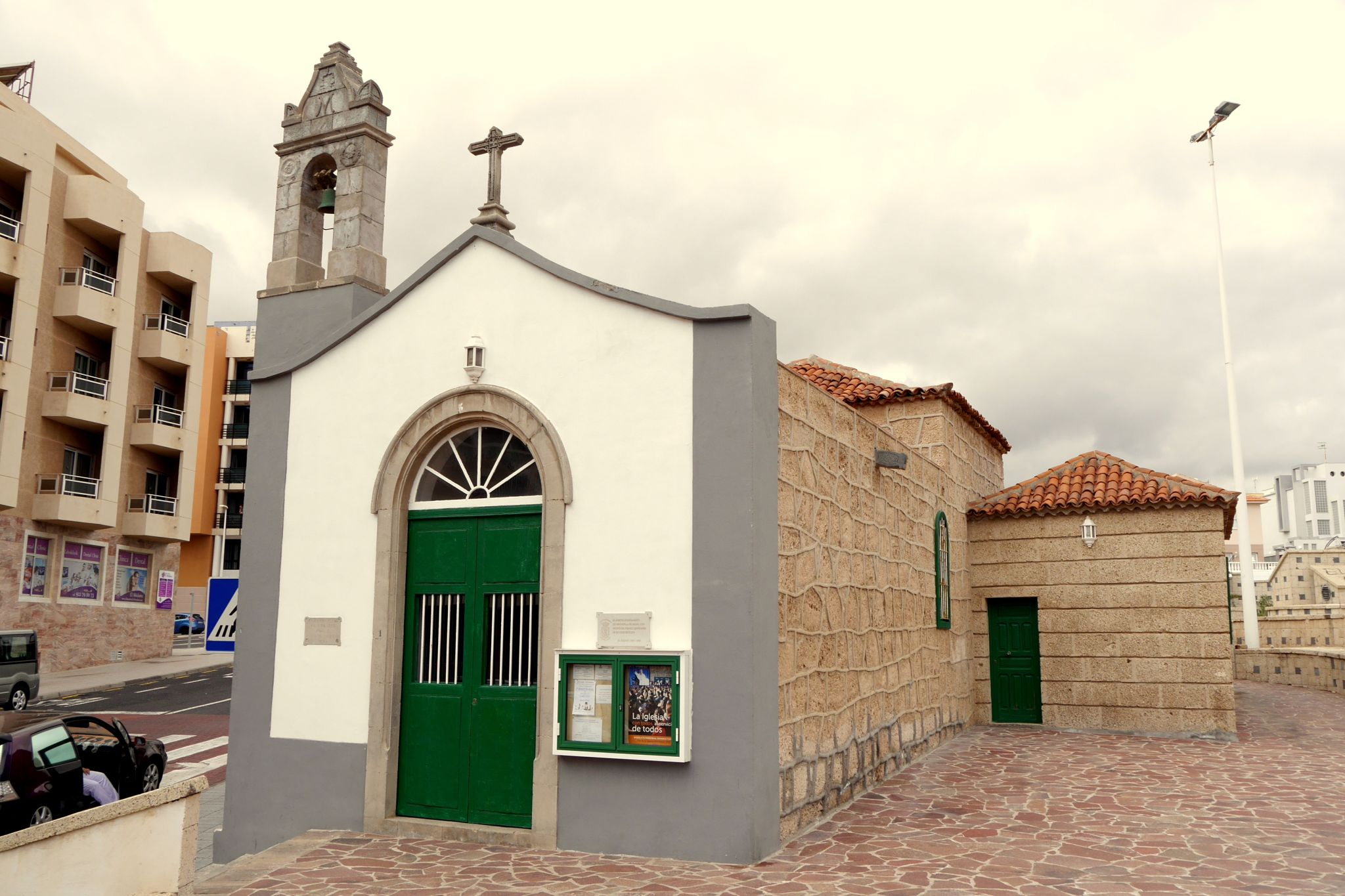 Dieses Bild von El Medano von Ronny Siegel ist lizenziert unter einer Creative Commons Namensnennung 4.0 International Lizenz . Beruht auf dem Werk unter .